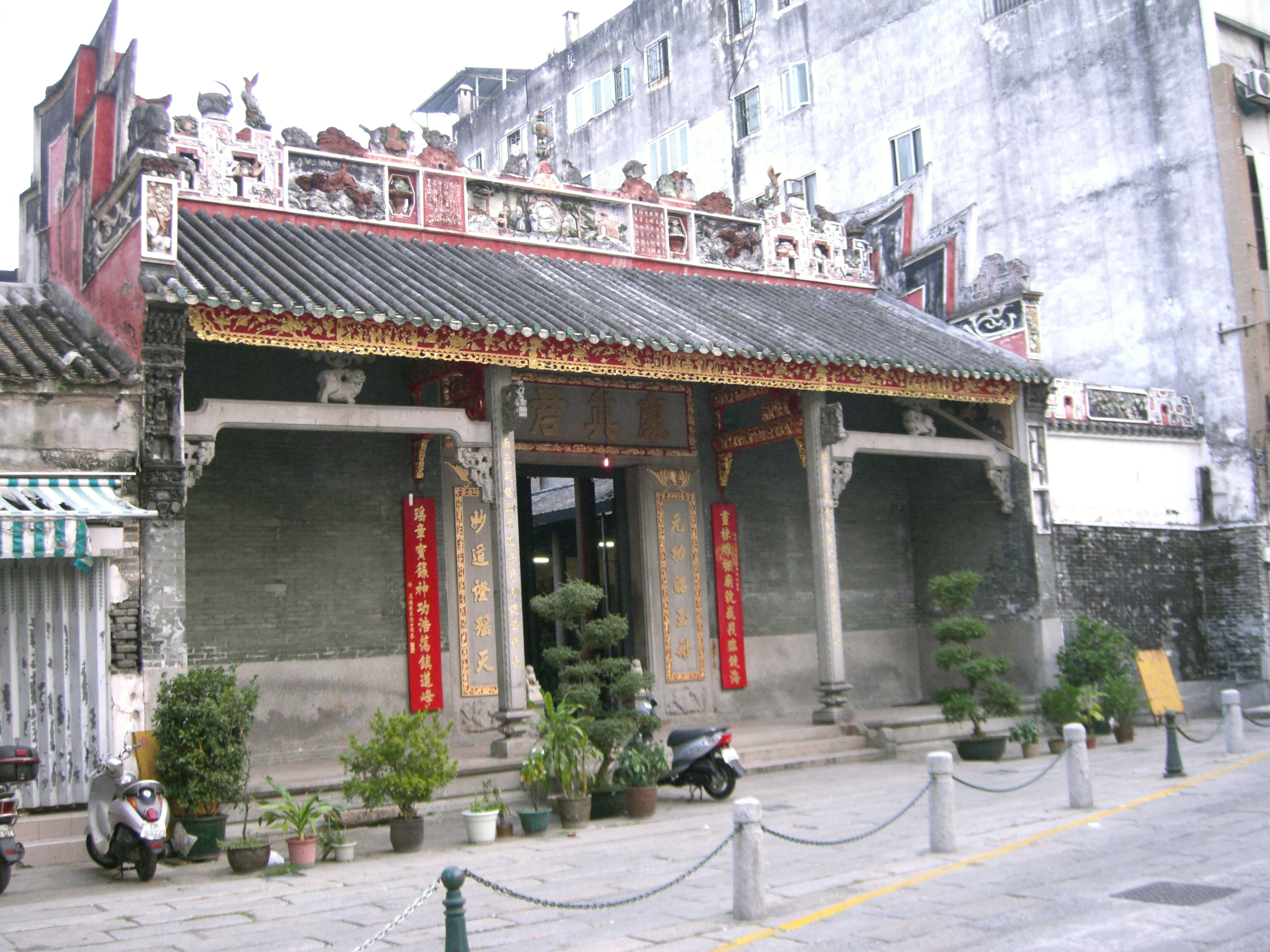 Rua de Cinco de Outubro